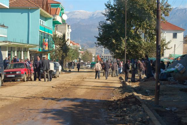 Burrel (Albania)